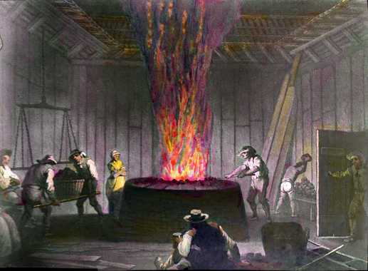 Kobberstikk utført av G. Haas etter Chr. Aug. Lorentzen malerier, originalene utført omkring 1790, viser interiør ved Bærums verk, masovnskransen, avfotografering, håndkolorert.